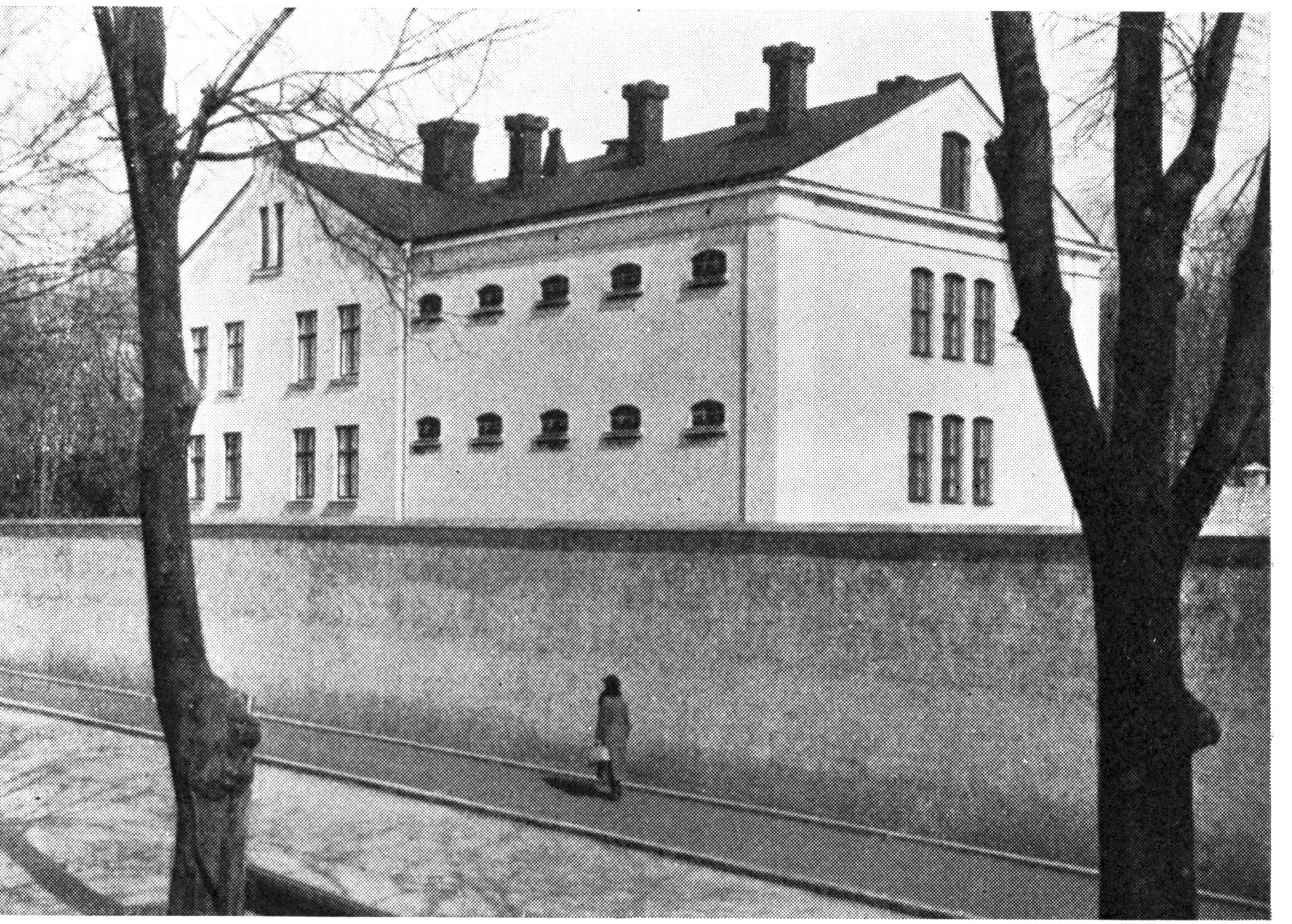 Länsfängelset i Halmstad